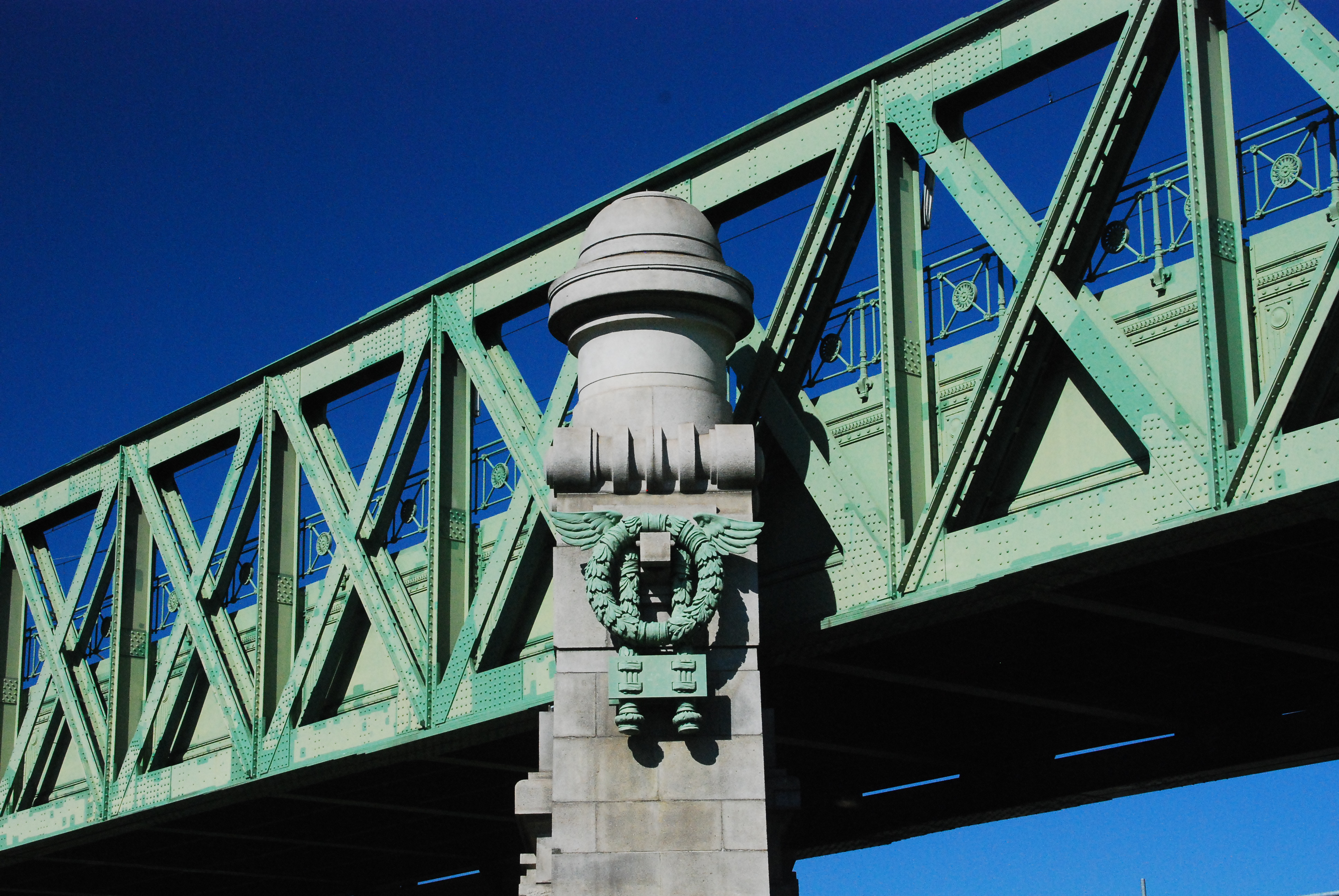 Eisenbahnbrücke, Otto-Wagner-Brücke über die Wienzeile samt Anschlussbauwerken